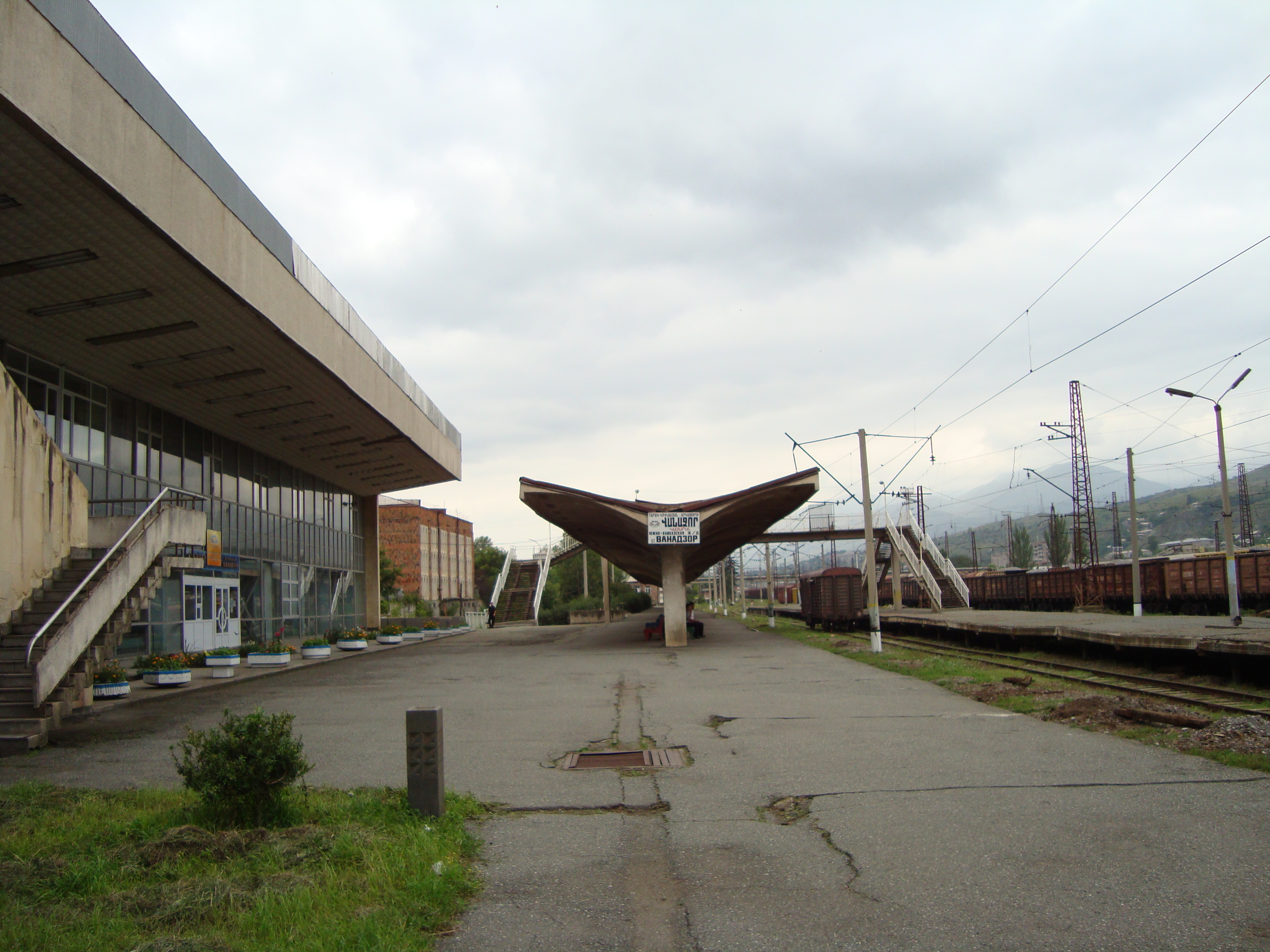 Railroad station in Vanadzor, marz (province) Lori, Republic of Armenia.